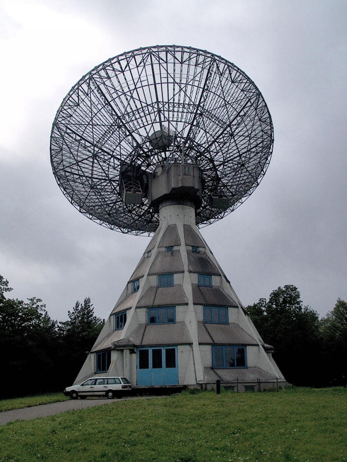 Radioteleskop Astropeiler von 1956 bei Bad Münstereifel mit 25 m-Schüssel